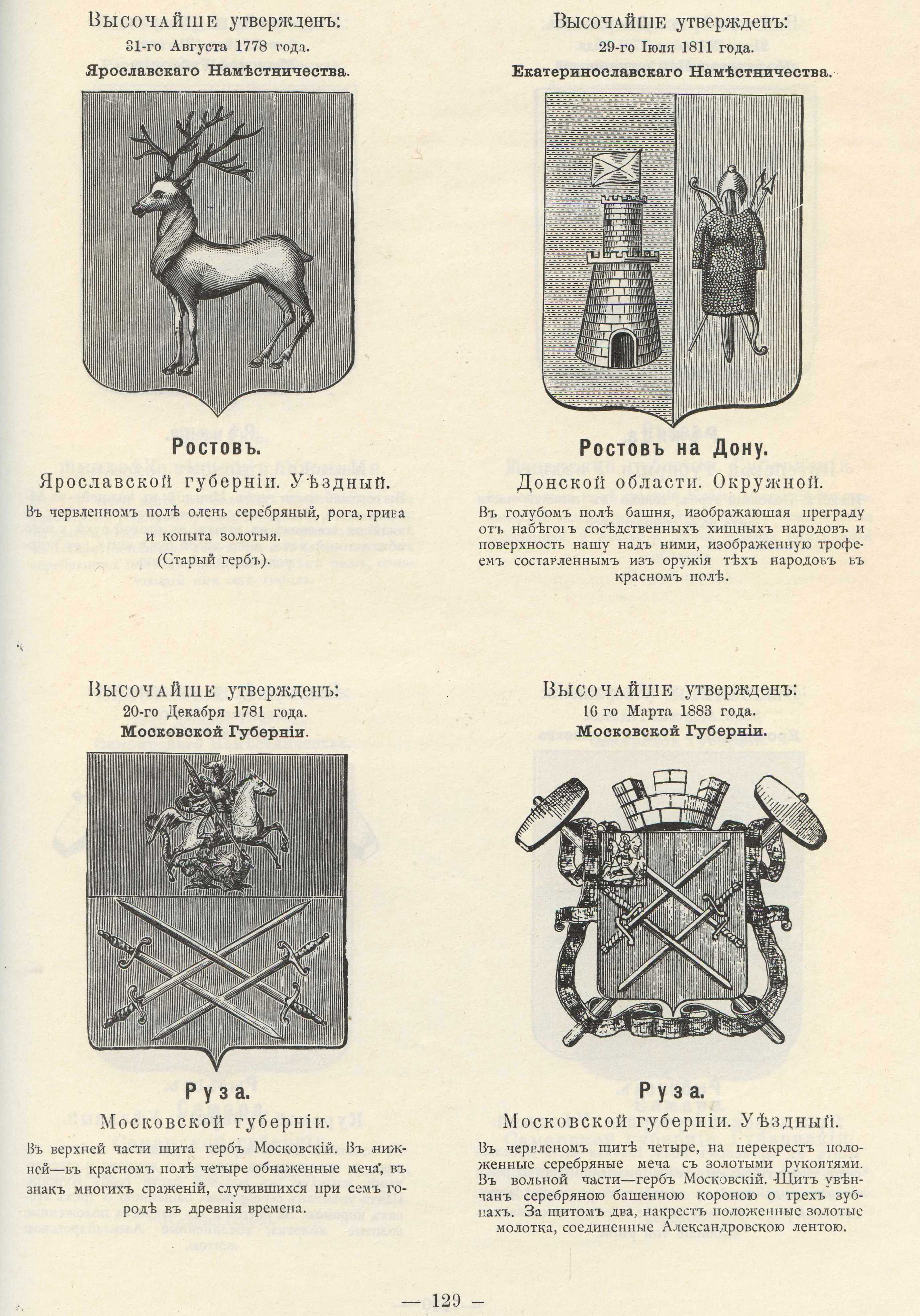 Official Russian Empire coats of arms. Гербы городов Российской Империи Ростов (Великий), Ростов на Дону, Руза с официальными описаниями в Гербовнике Винклера.